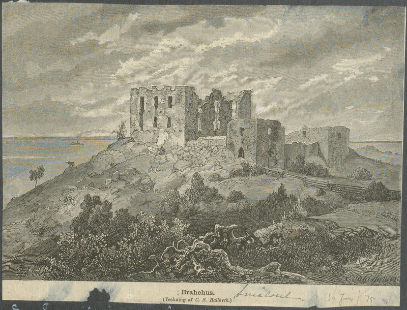 Raä-nr: Gränna 43:1. Slottsruinen från sydöst. Illustration i Svenska Familj-Journalen 1875, efter blyertsteckning av Carl Svante Hallbeck. Motiv: Gränna 43:1 Kategori: Slott/herresäte, Teckning Raä-nr: Gränna 43:1. Slottsruinen från sydöst. Illustration i Svenska Familj-Journalen 1875, efter blyertsteckning av Carl Svante Hallbeck. Gränna 43:1.